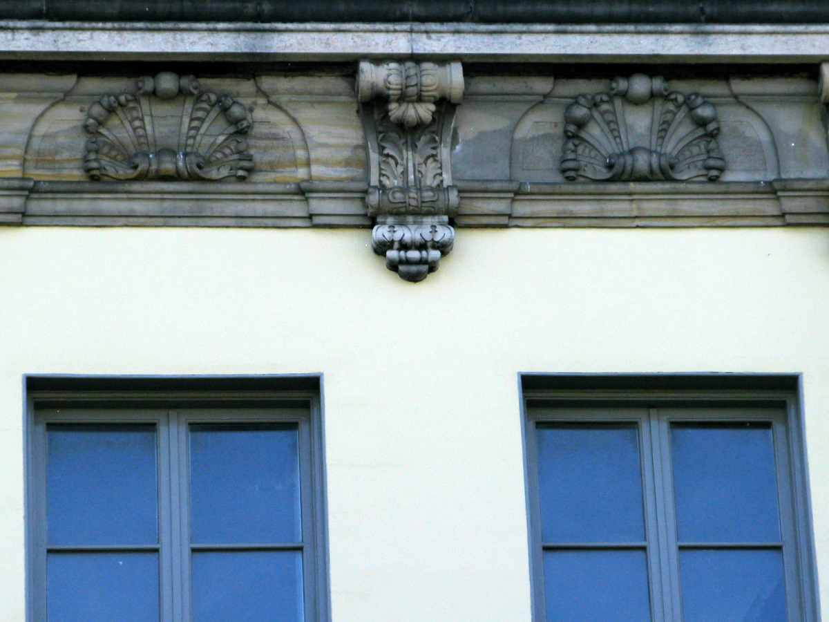 amsterdam, prins hendrikkade 142 / detail